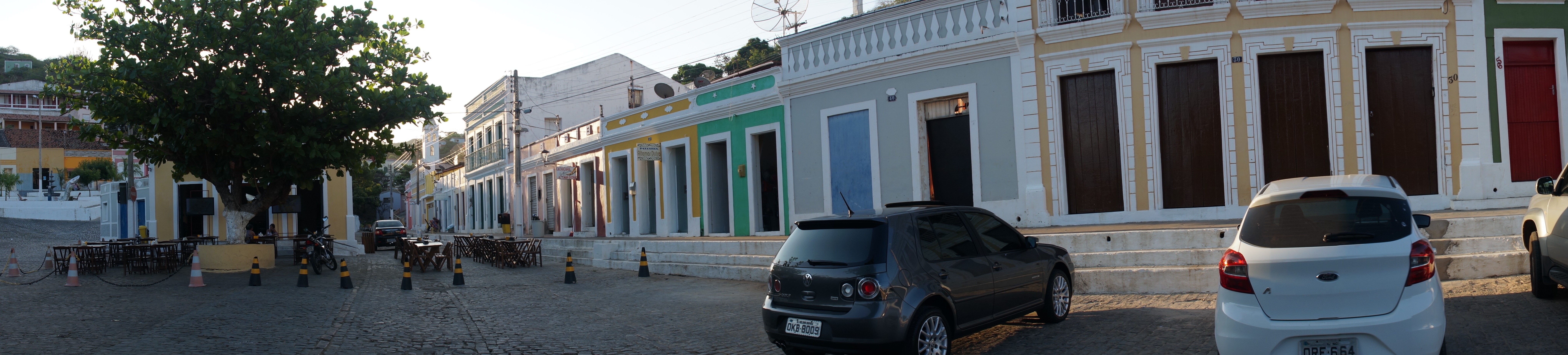 Patrimônio Histórico no Rio São Francisco.